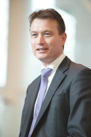 Halbe Zijlstra; staatssecretaris van Onderwijs, Cultuur en Wetenschap